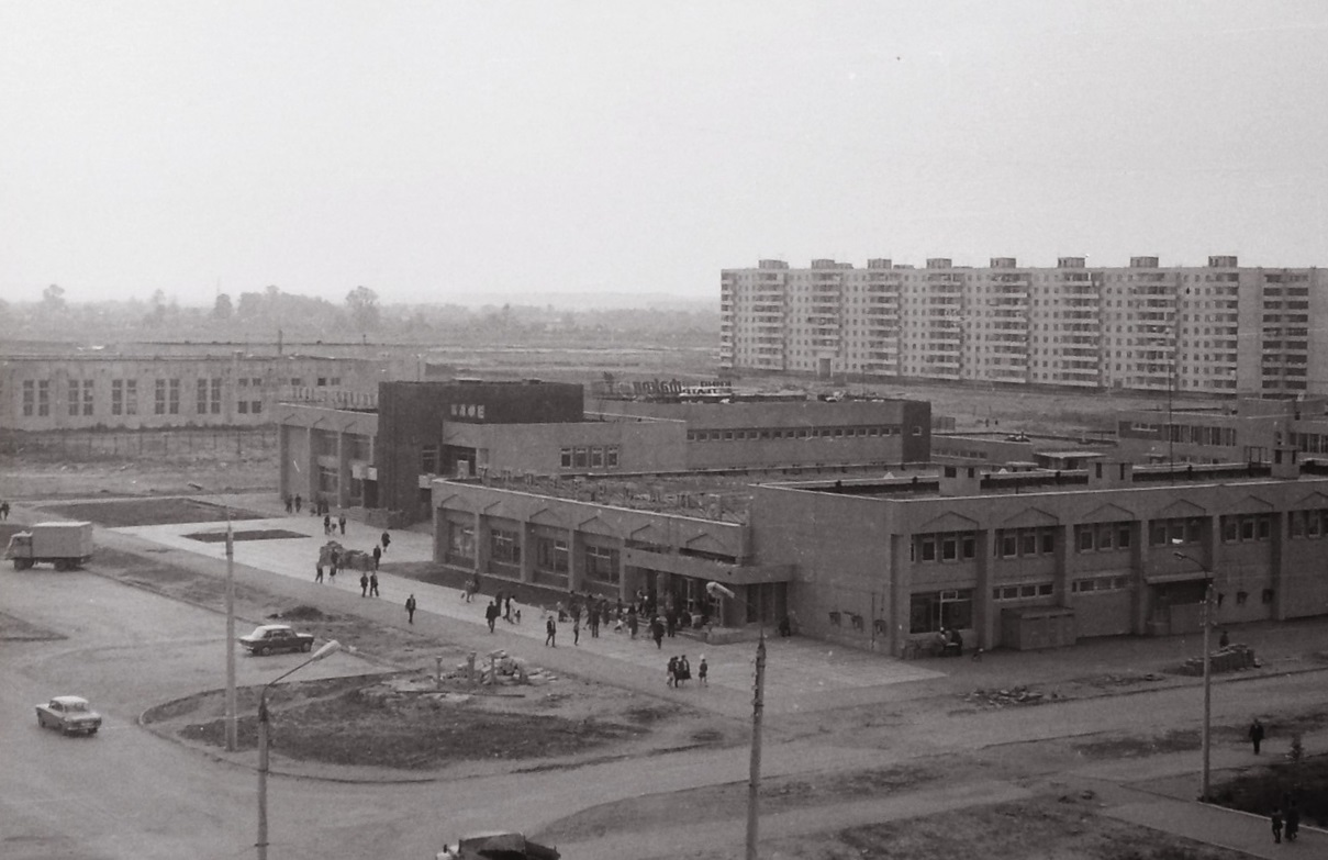 Универсам N1 на улице Адоратского в Ново-Савиновском районе Казани